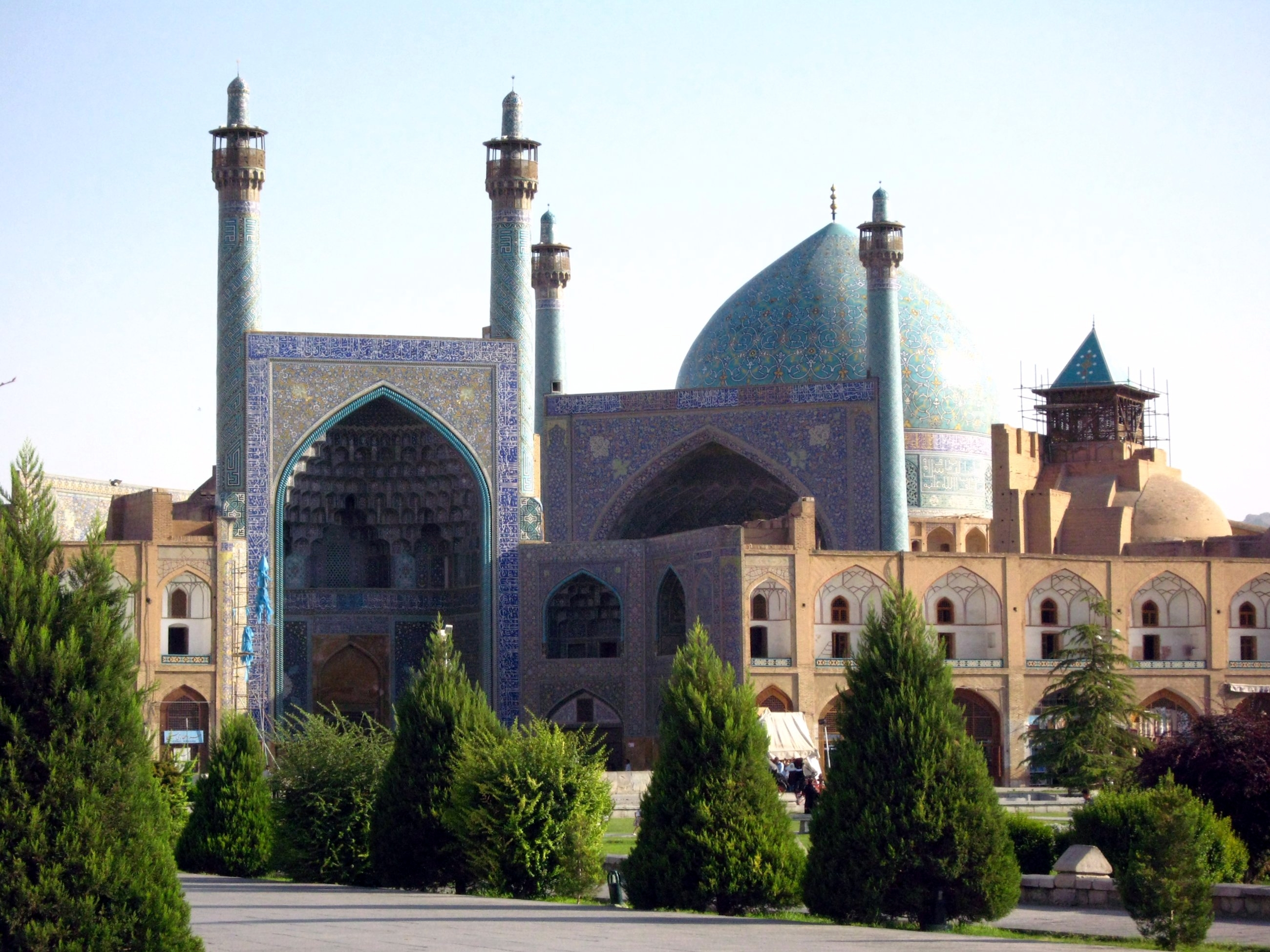 Masjed-e Imam (Imam Mosque), Isfahan